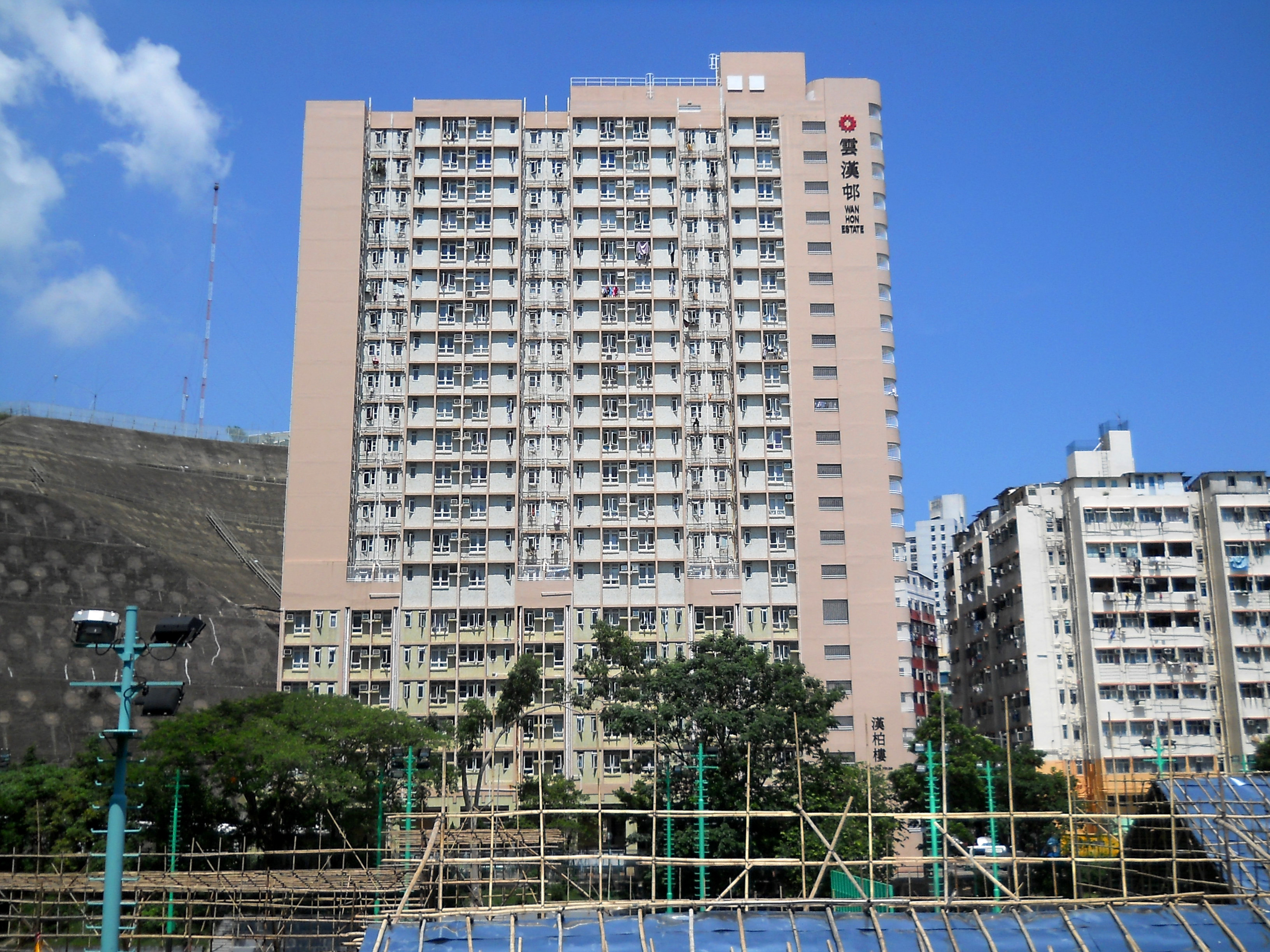 中文（香港）: 雲漢邨漢柏樓